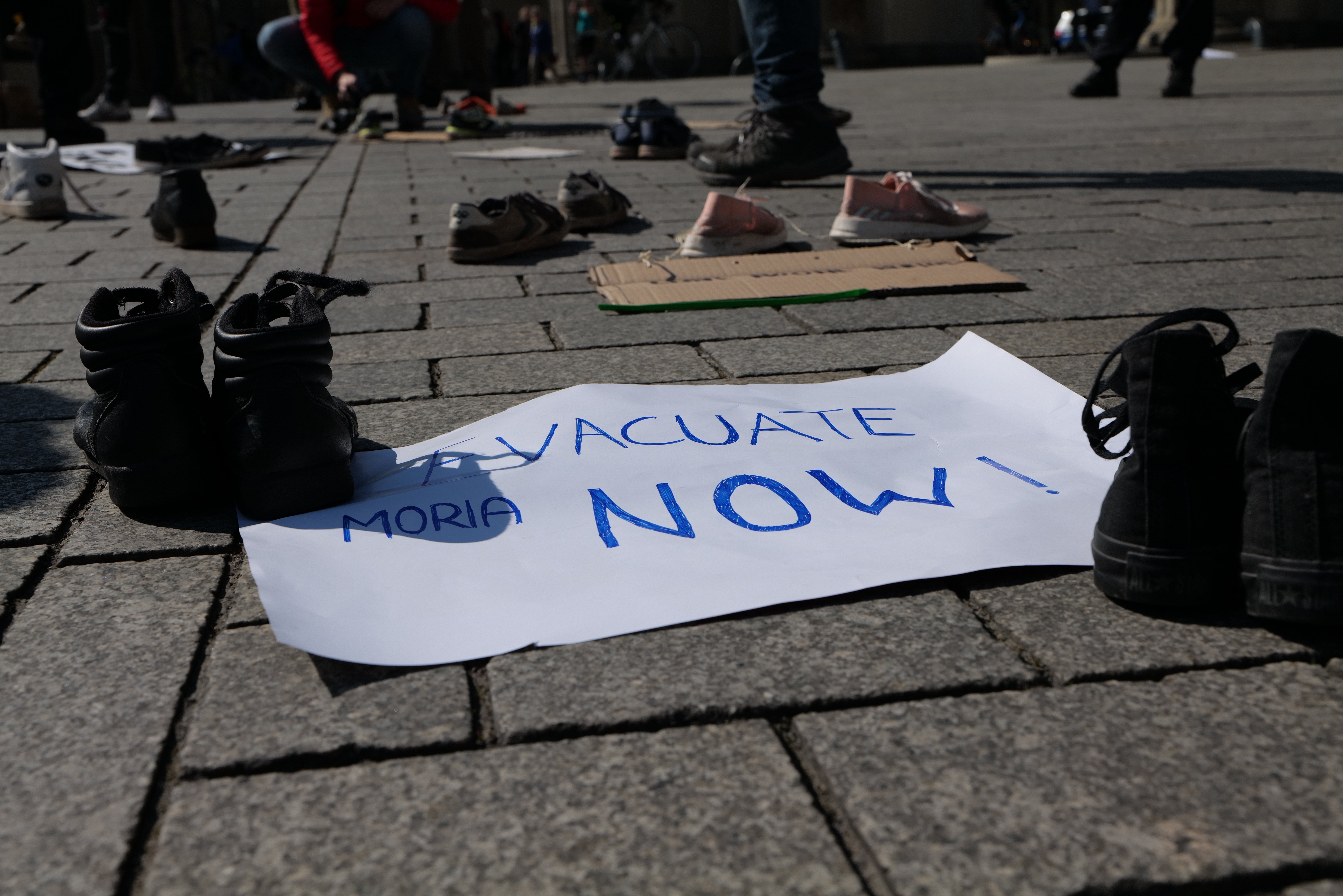 Protest für die Evakuierung der Geflüchteten aus den Lager auf den Griechischen Inseln am Brandenburger Tor in Berlin am 5. April 2020.